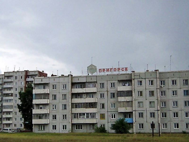 Пригорск. Хакасия.